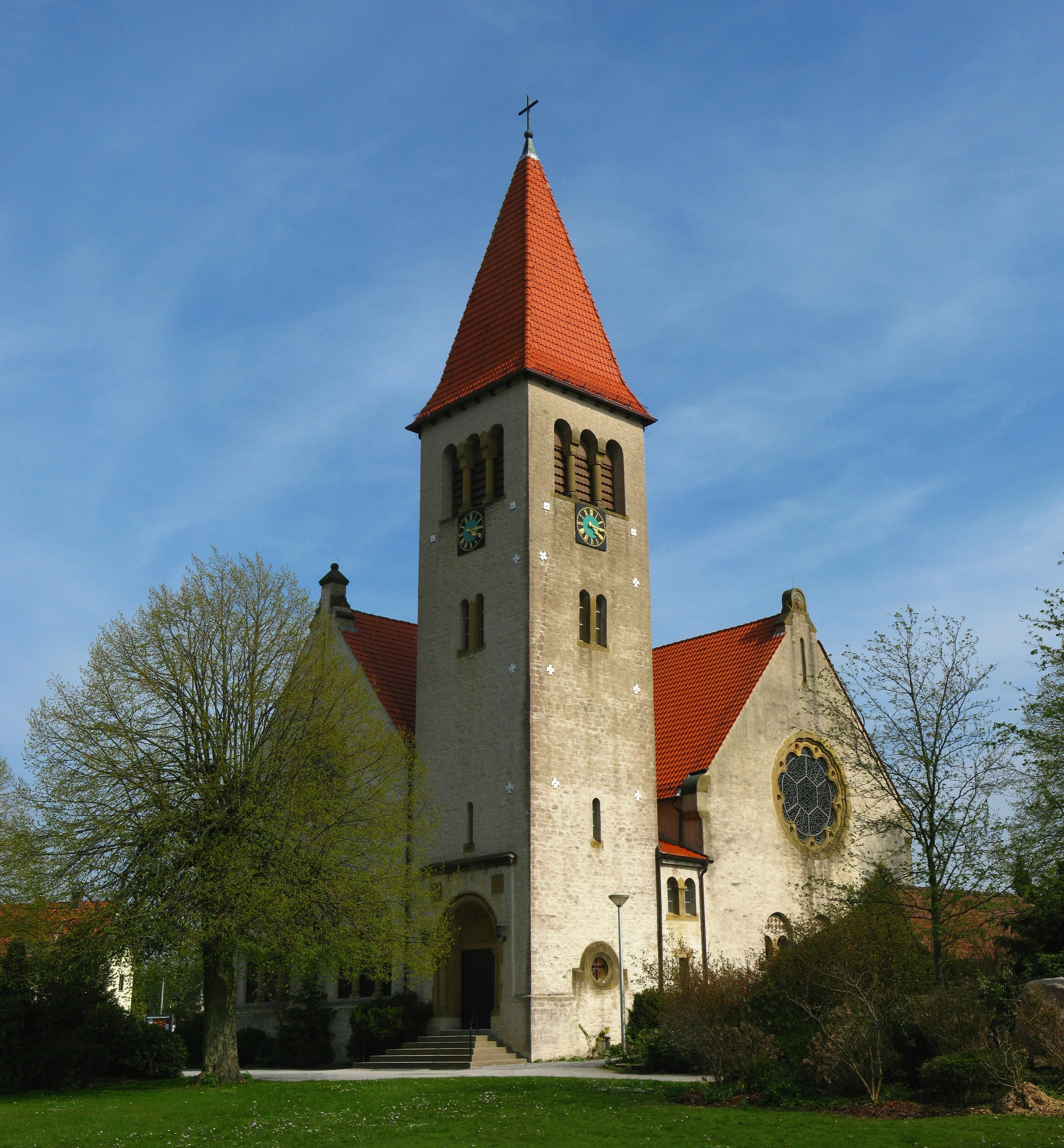 Evangelisch reformierte Kirche in Helpup This is the photograph of an architectural monument. It is part of the list of cultural monuments of Oerlinghausen, no. 46